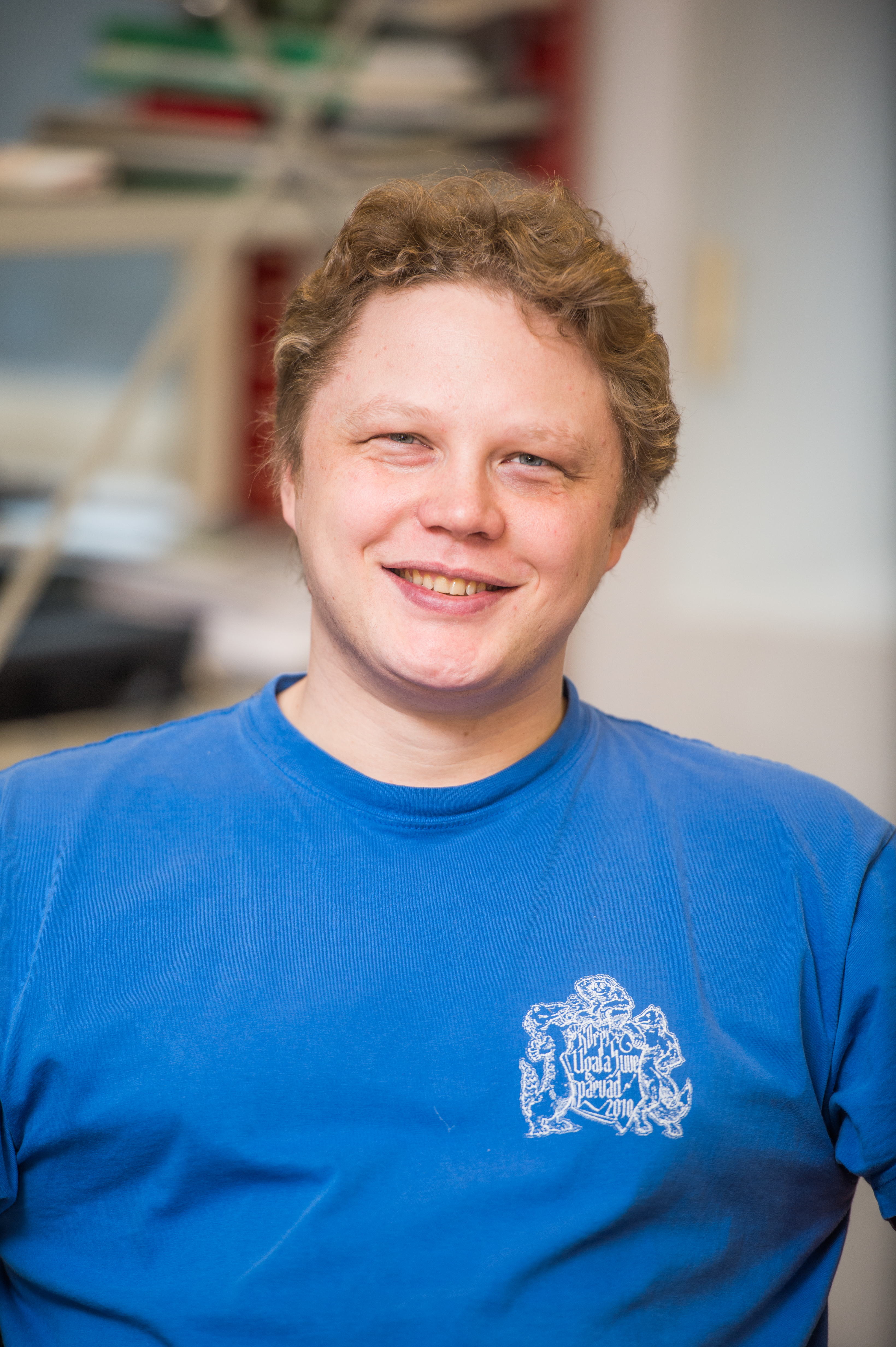 Vahur Koorits